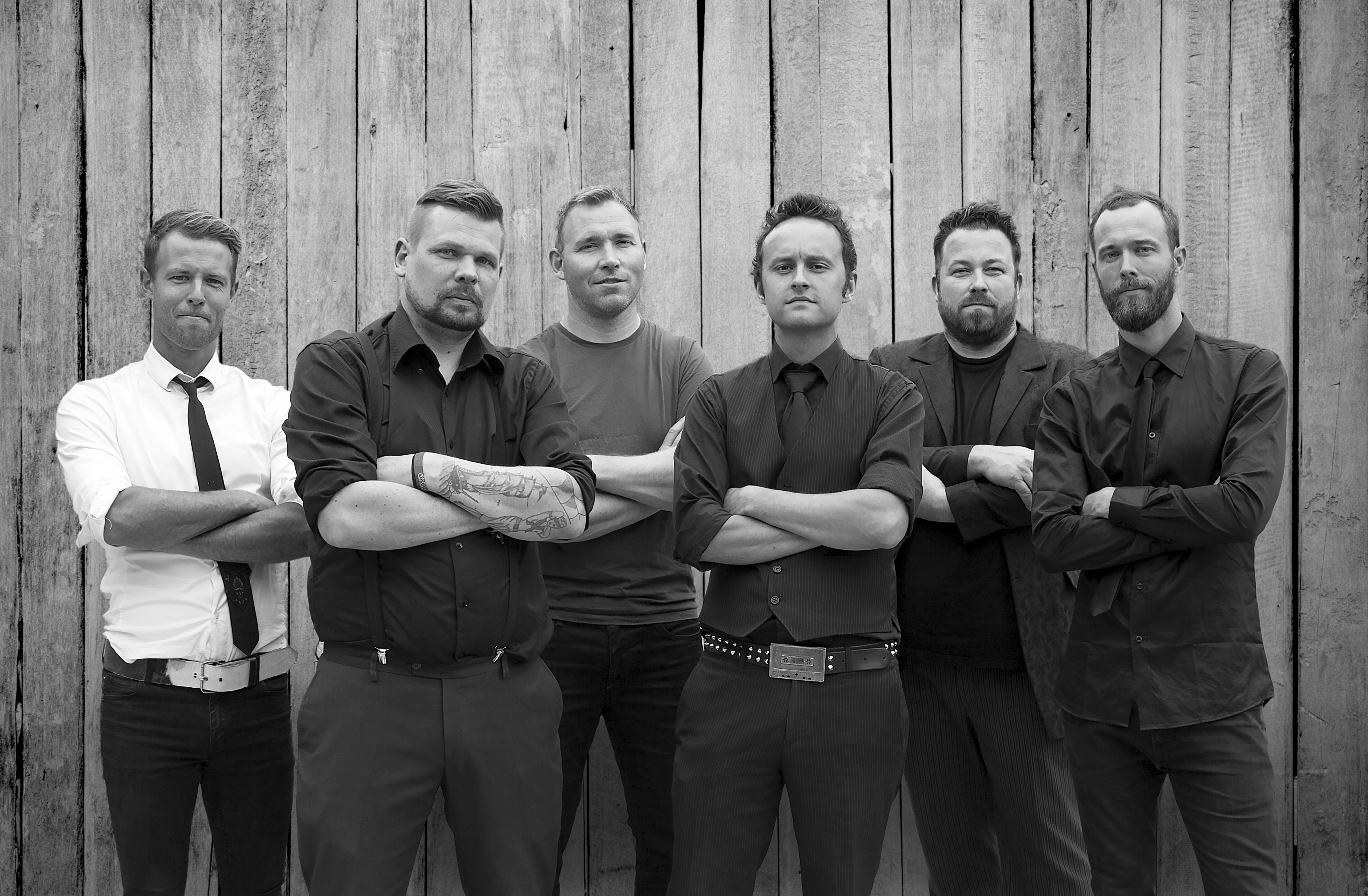 Bilde av Ogras under Raumarock 2016